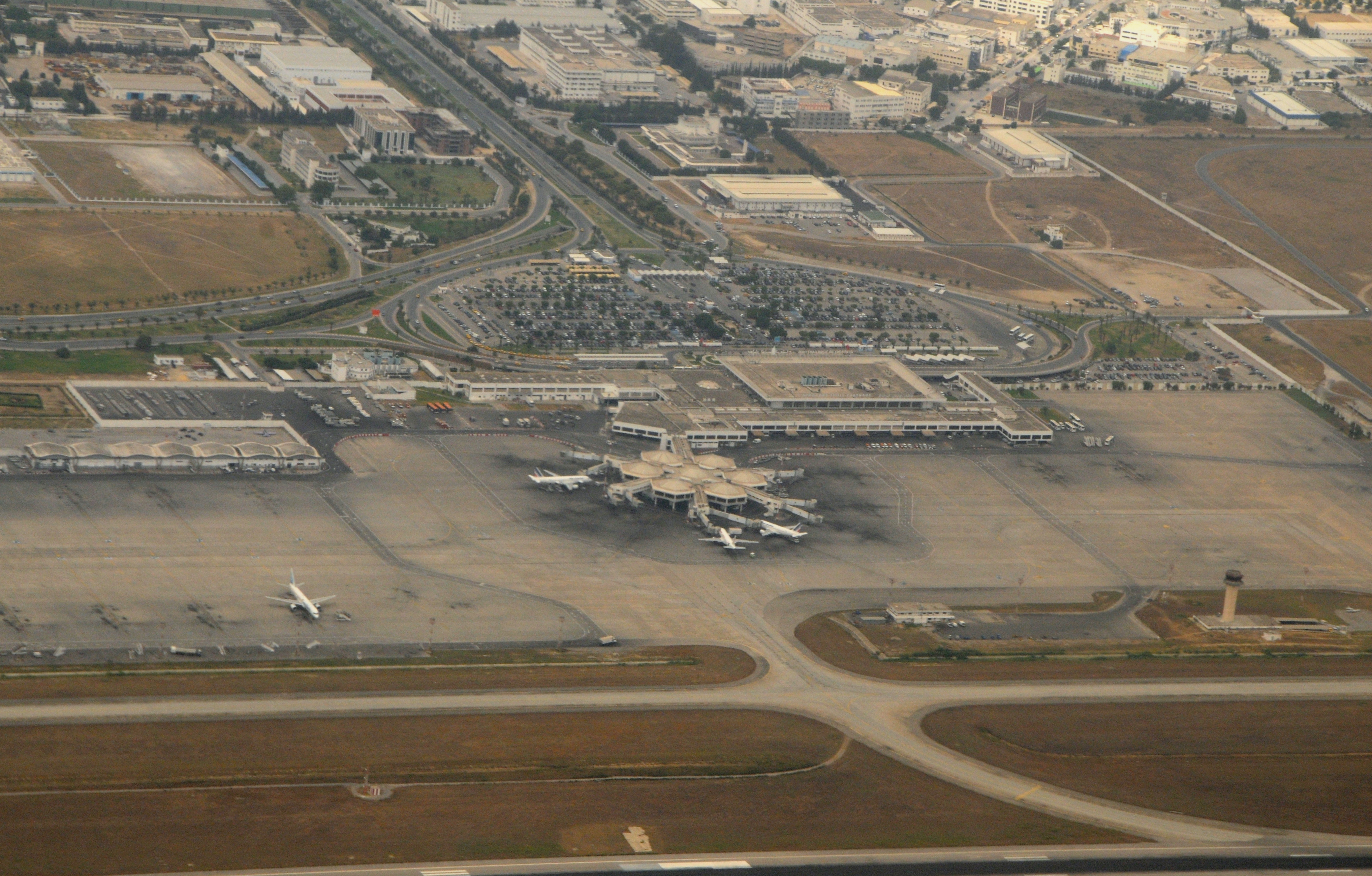 Vue aérienne de l'aéroport de Tunis Carthage